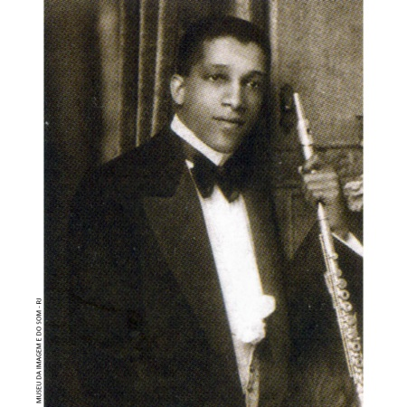 Foto do flautista Agenor Bens (circa 1870 Cordeiro, RJ - circa 1950 Rio de Janeiro, RJ). Agenor Bens gravou vários músicas, dentre as quais "Cruzes Minha Prima!", de Joaquim Callado, que pode ser ouvida neste link File:Cruzes, minha prima! Agenor bens Joaquim Callado .ogg